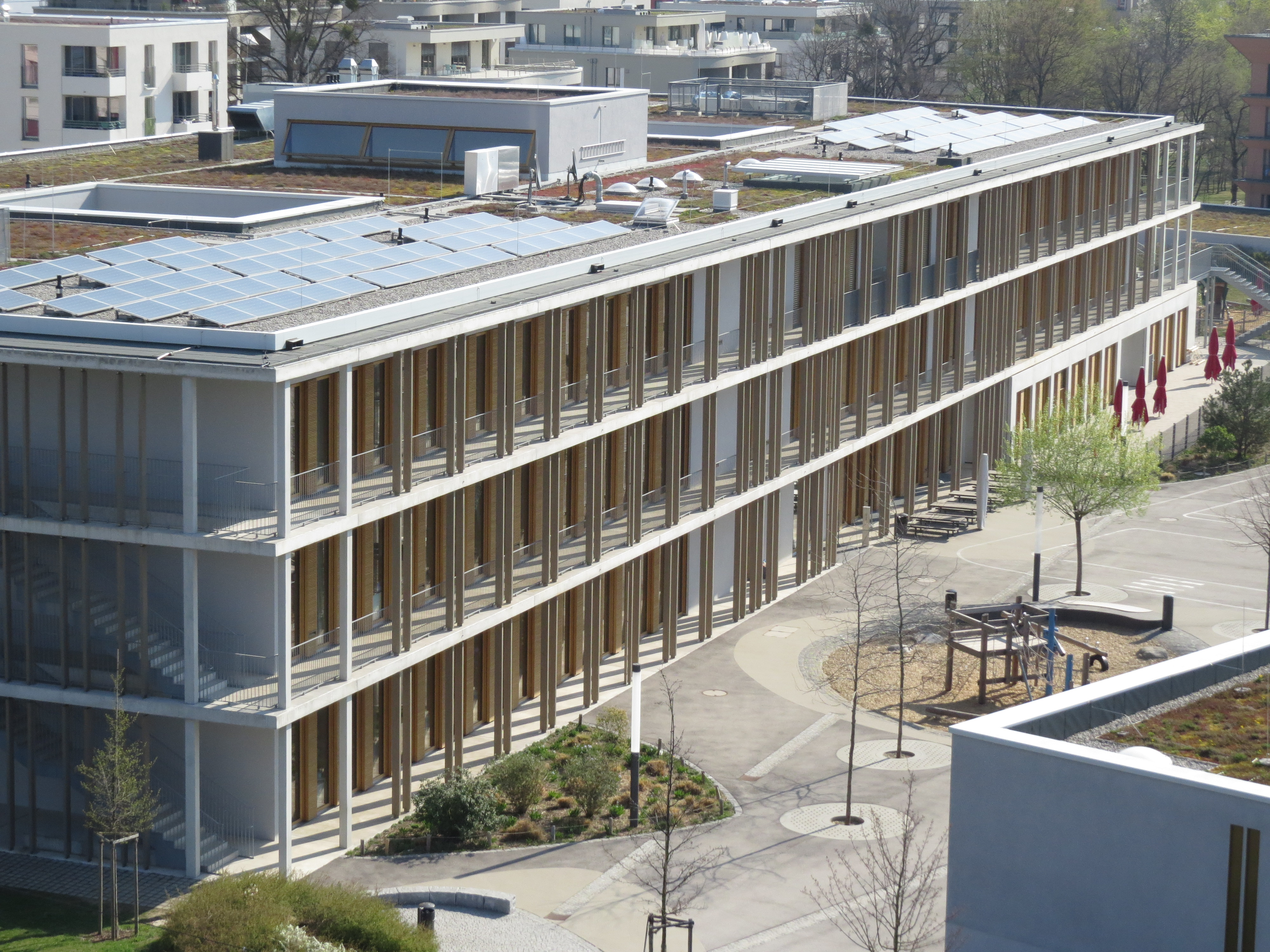 Grundschule am Bauhausplatz, Domagkpark, Schwabing-Freimann, München, Rückseite mit Pausenhof